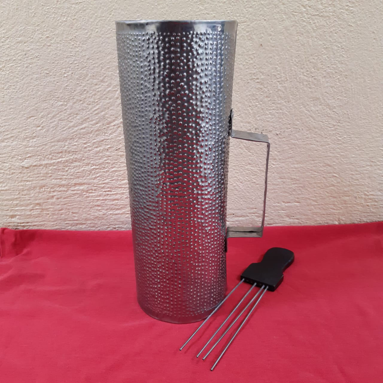 Güiro de metal